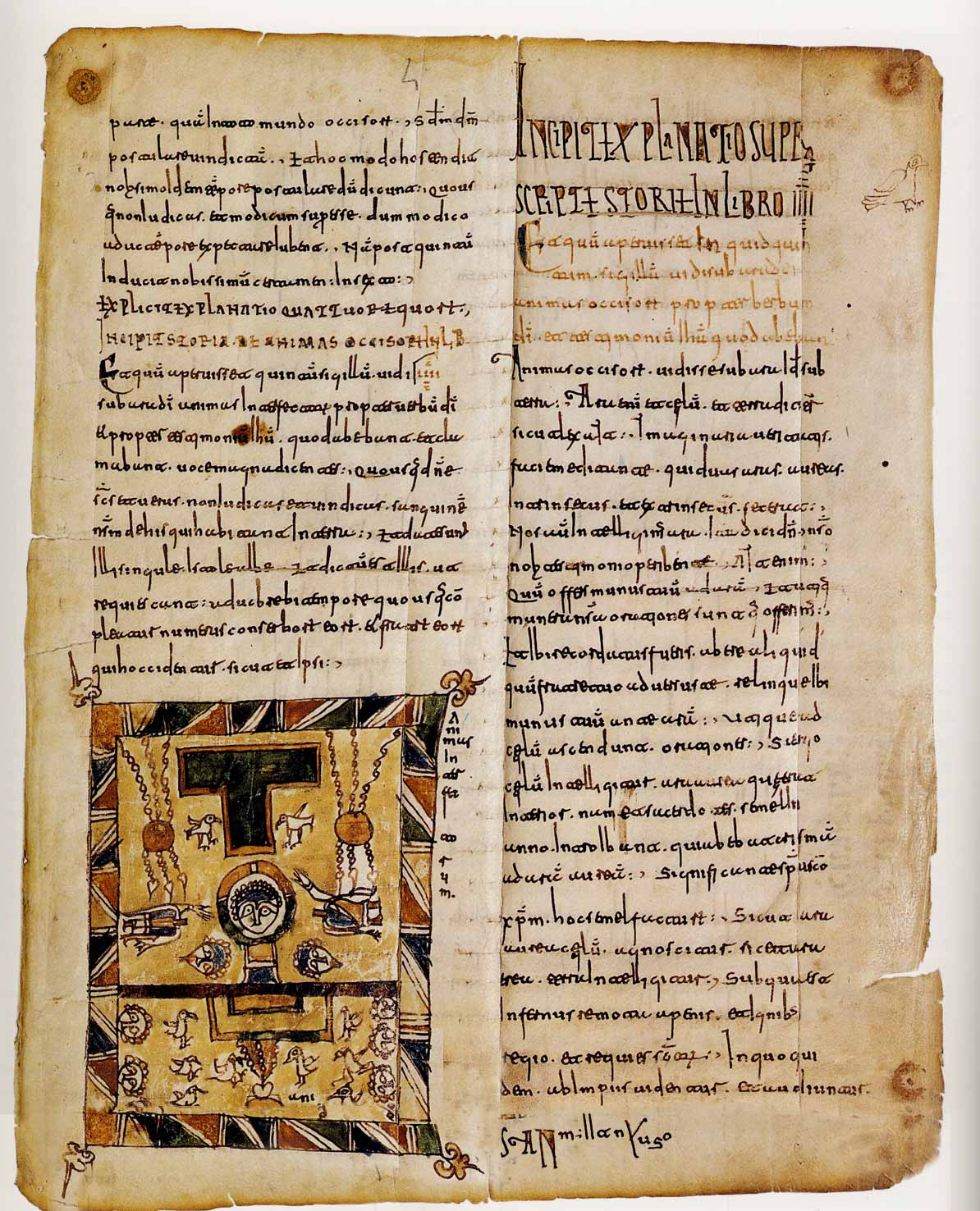 Beato de Cirueña. Hoja suelta.